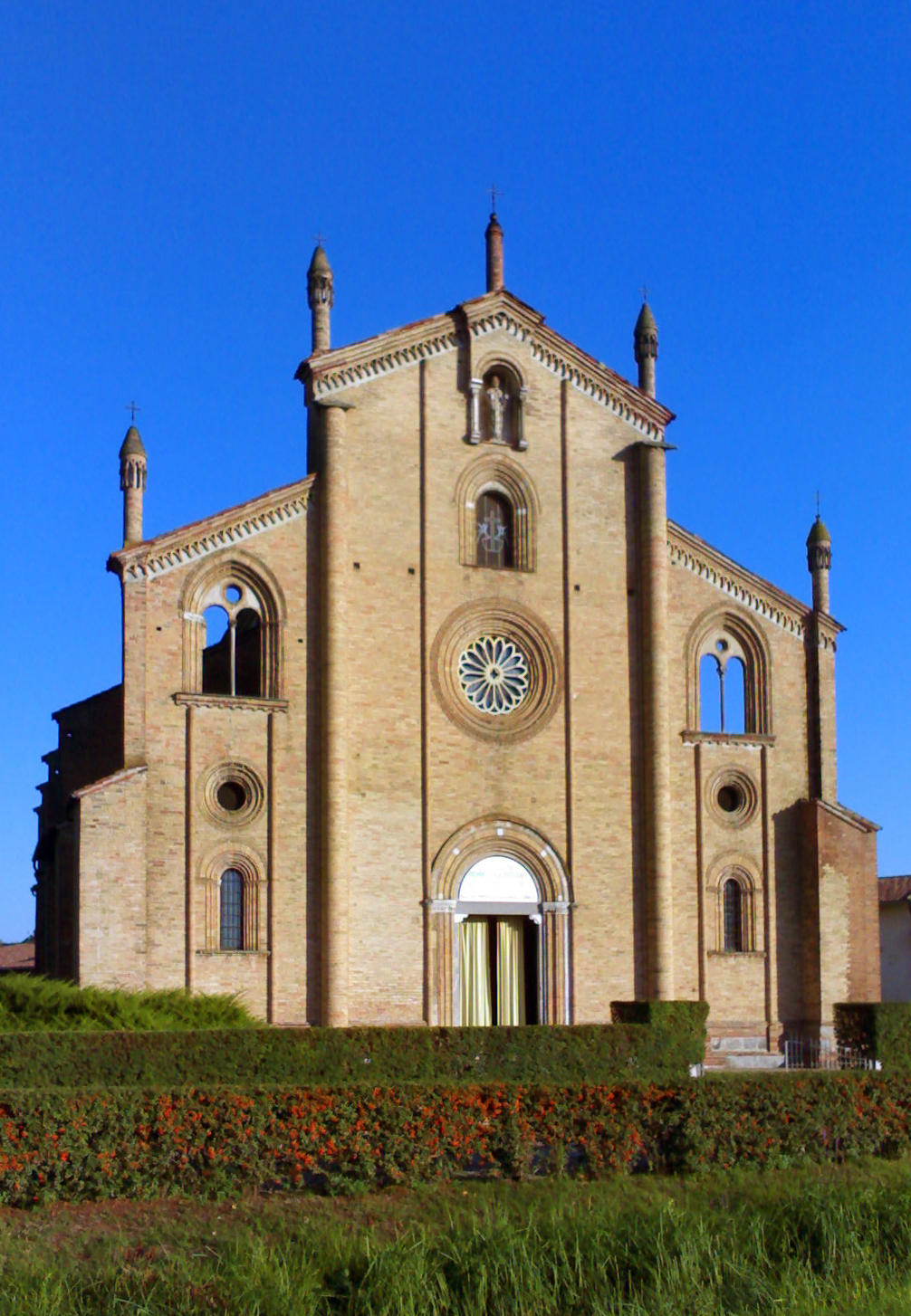 Chiesa di San Bassiano a Lodi Vecchio (LO)